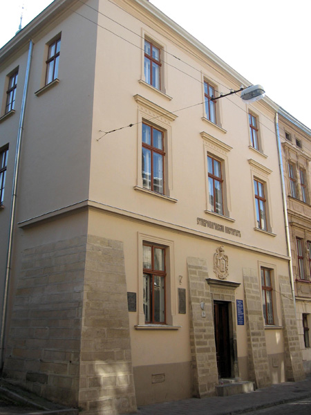 Типография Ставропигийского братства во Львове